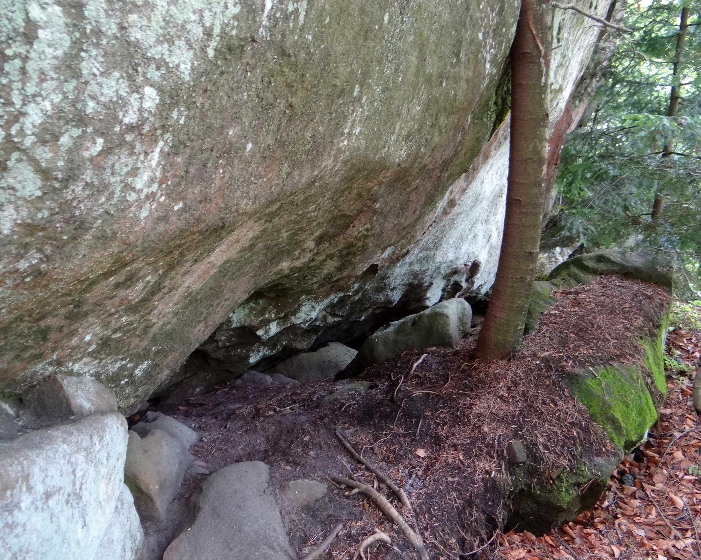 Schronisko w Omszałej Skale w rezerwacie przyrody Diable Skały w Bukowcu